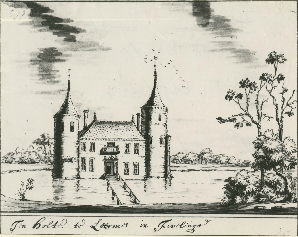 De borg Boukum bij Zeerijp zoals deze er rond 1650 moet hebben uitgezien. Stellingwerff's kopieën van tekeningen van de Groningse borgen gaan namelijk terug op originelen van 50 jaar eerder noot 5. Foto van Stellingwerff's tekening uit 1917 (Teunisse & Labots, Rotterdam).